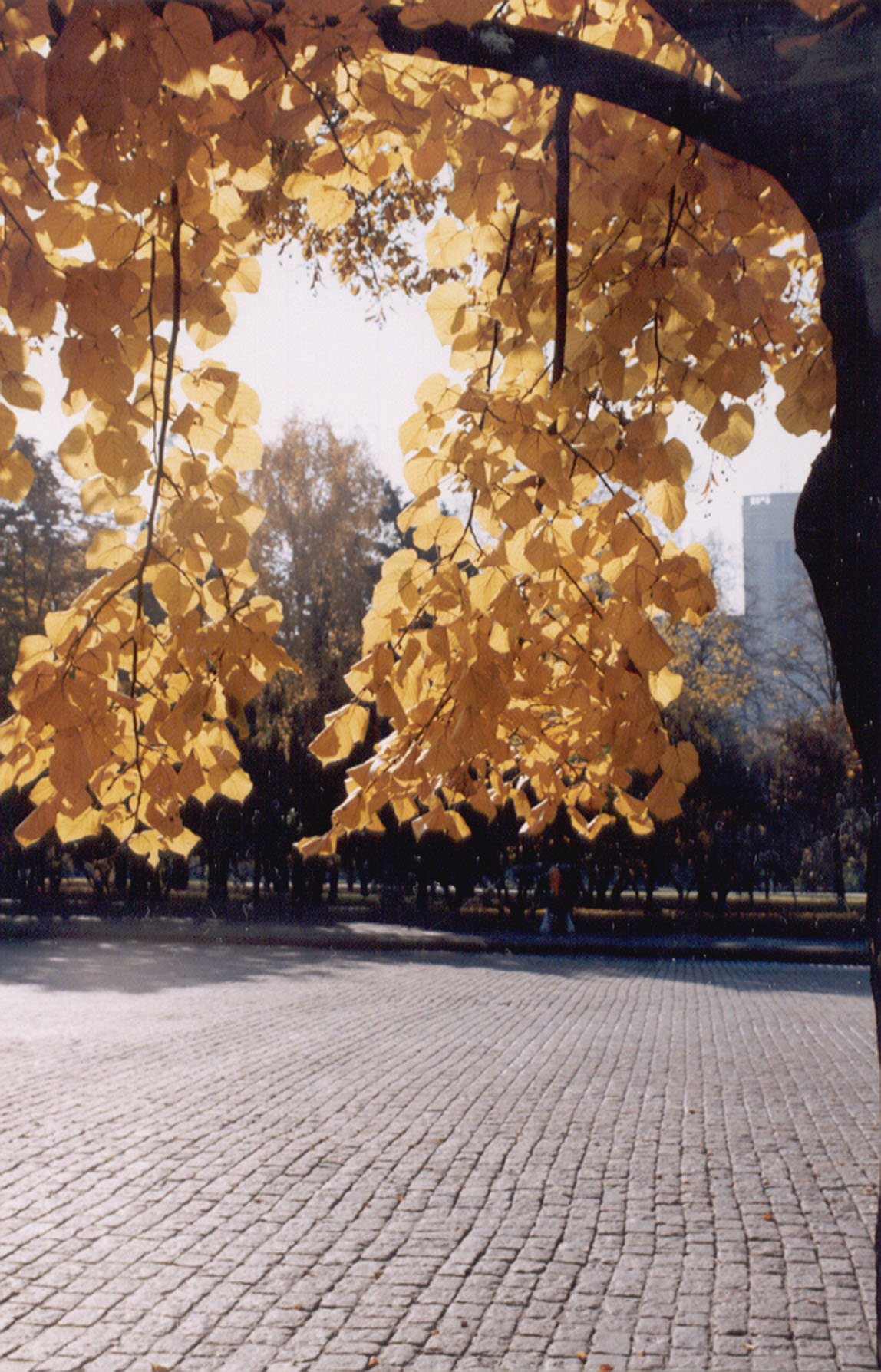 Из серии "Харьков и харьковцы"